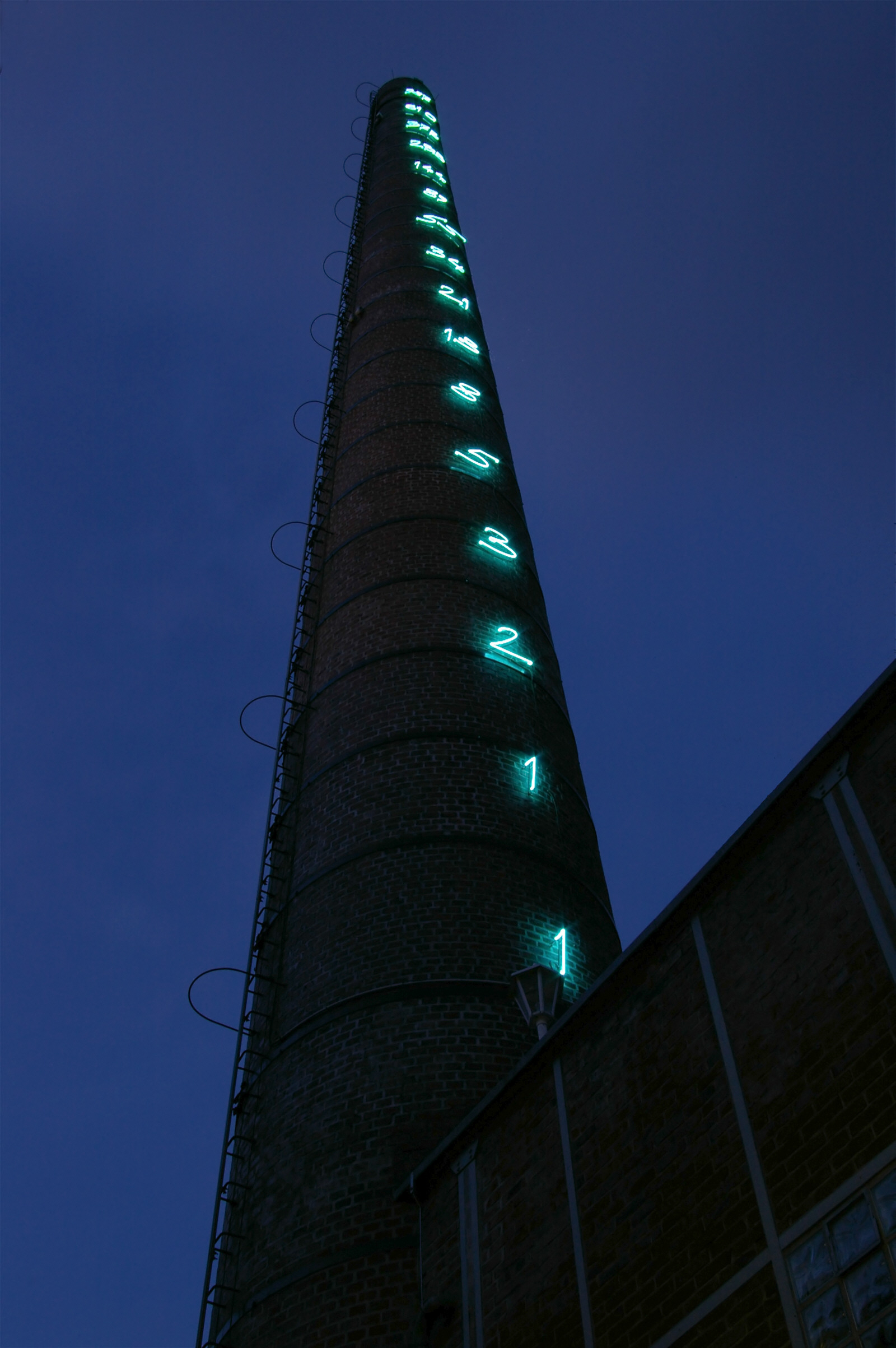 Unna, Kamin der ehemaligen Lindenbrauerei, heute soziokultutrelles Zentrum. Die nachts erleuchteten Fibonacci-Zahlen, ein Lichtkunstwerk von Mario Merz, sind Wahrzeichen des Zentrums für Internationale Lichtkunst. In Deutschland panoramafrei / covered by freedom of panorama.